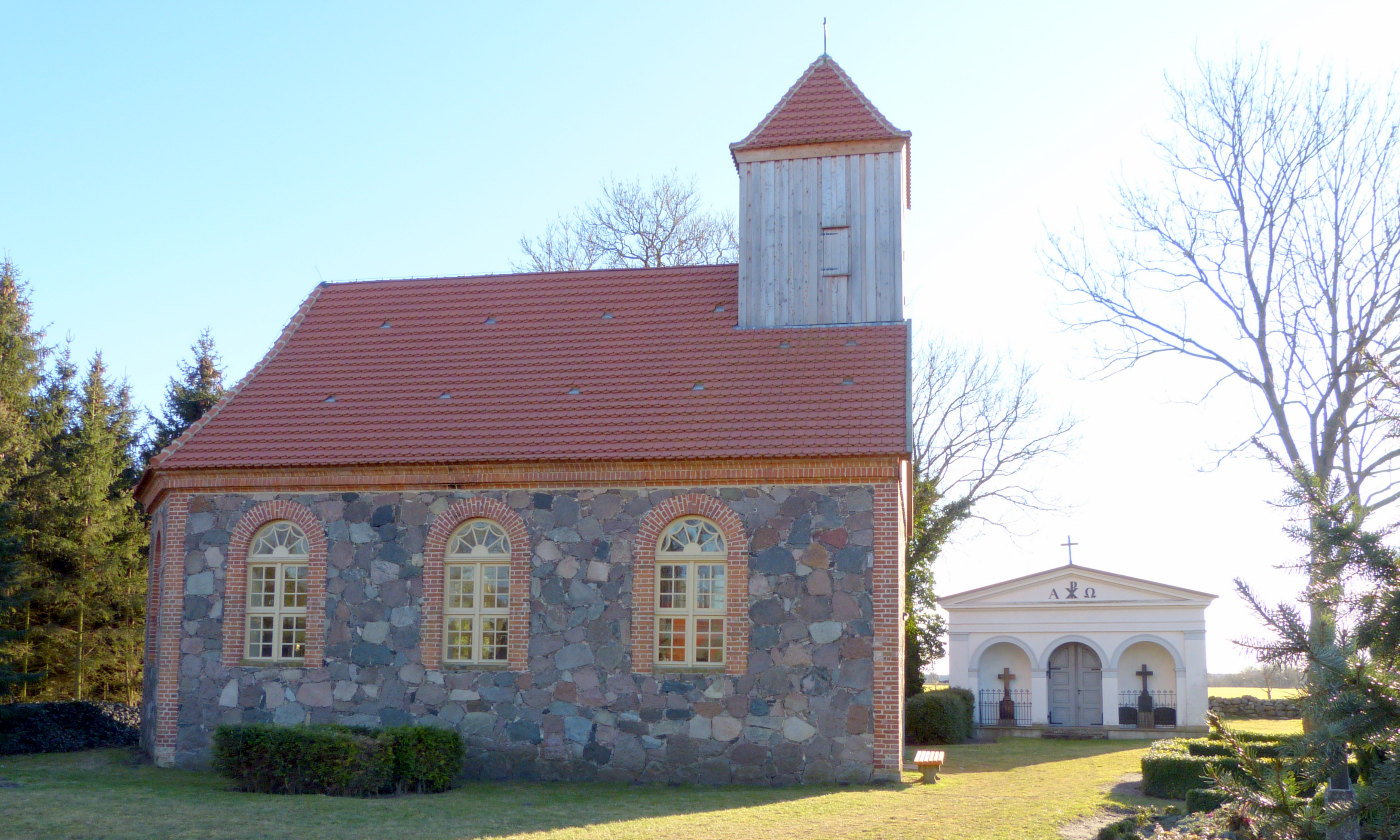 Kirche in Pensin, Gemeinde Kletzin, Nordseite der Kirche, rechts das Mausoleum